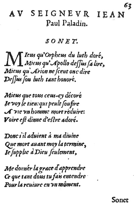 Sonnet pour J P Paladin, luthiste